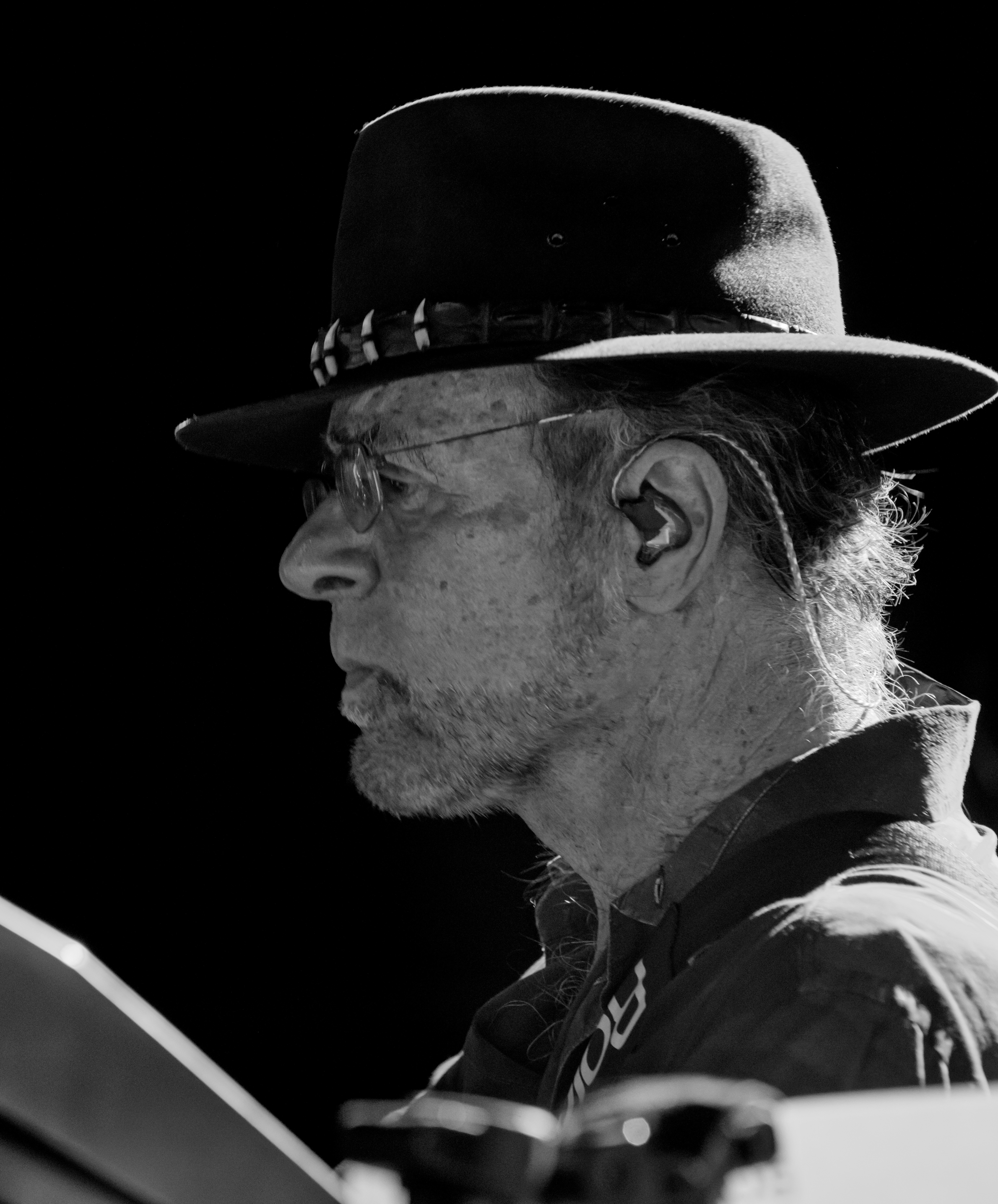 Bilder vom Zelt Musik Festival 2017 in Freiburg im Breisgau